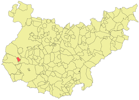 Situación del término municipal de Táliga respecto a la provincia de Badajoz, en España.